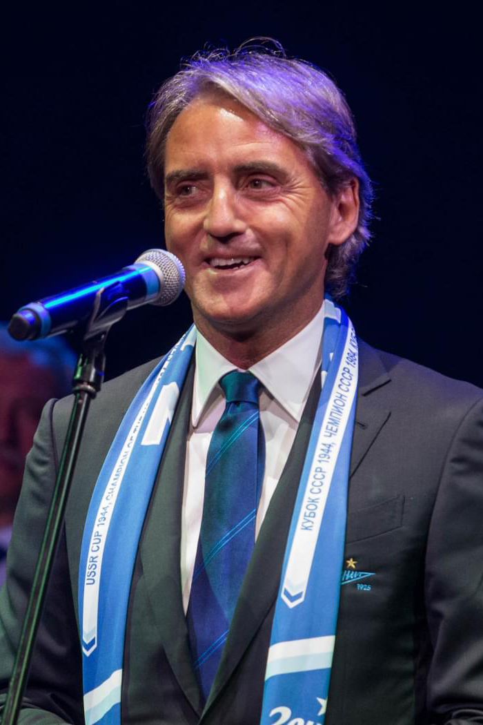 13.06.2017. Россия, Санкт-Петербург, «Ленинград Центр». Презентация нового главного тренера «Зенита» Роберто Манчини.